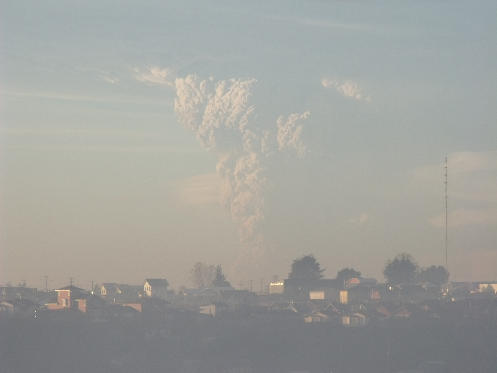 Impresionante imágen de hace algunos meses del volcán puyehue, desde Puerto Montt.